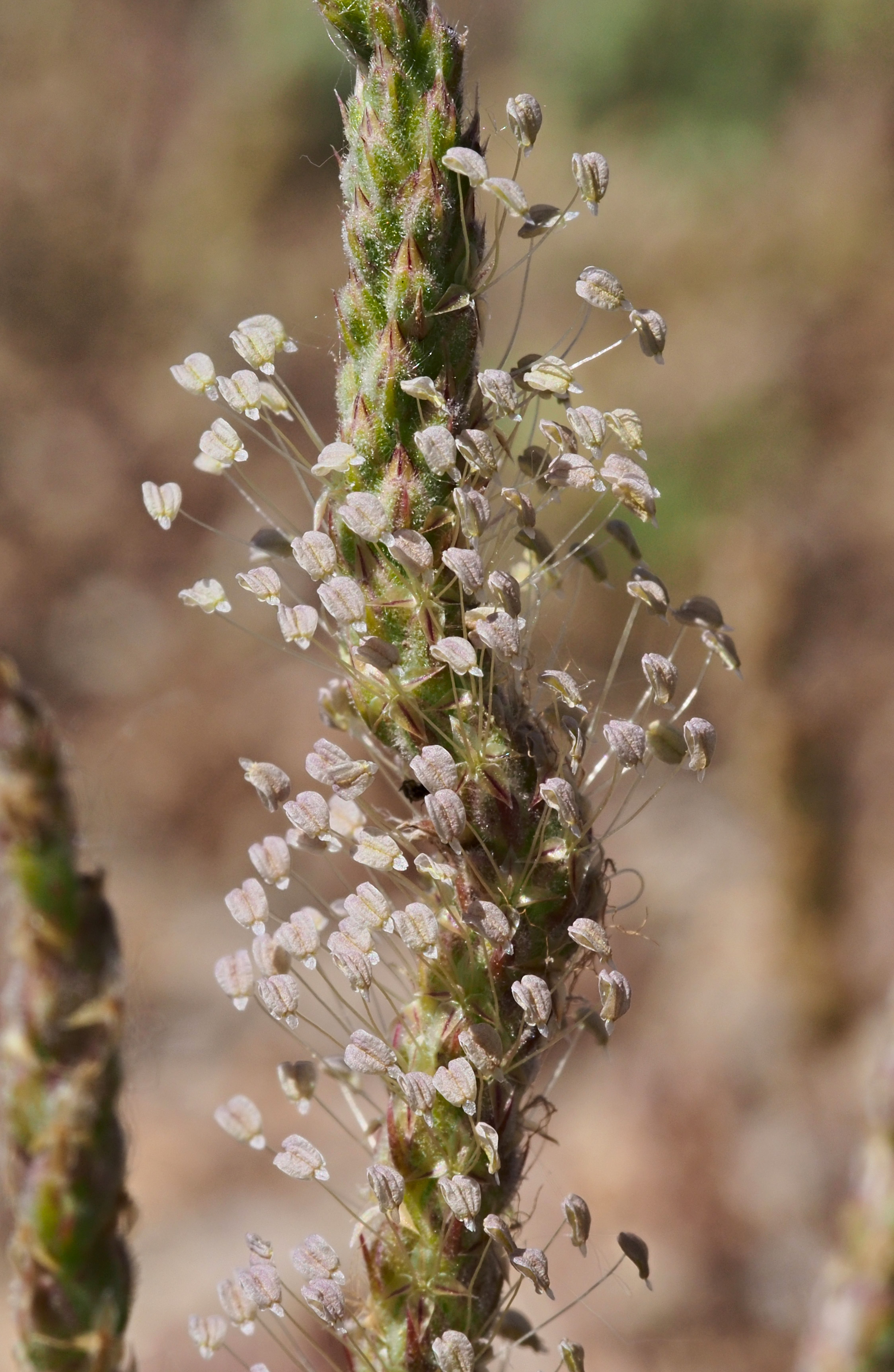 Plantago coronopus, Losar de la Vera (Cáceres, España).